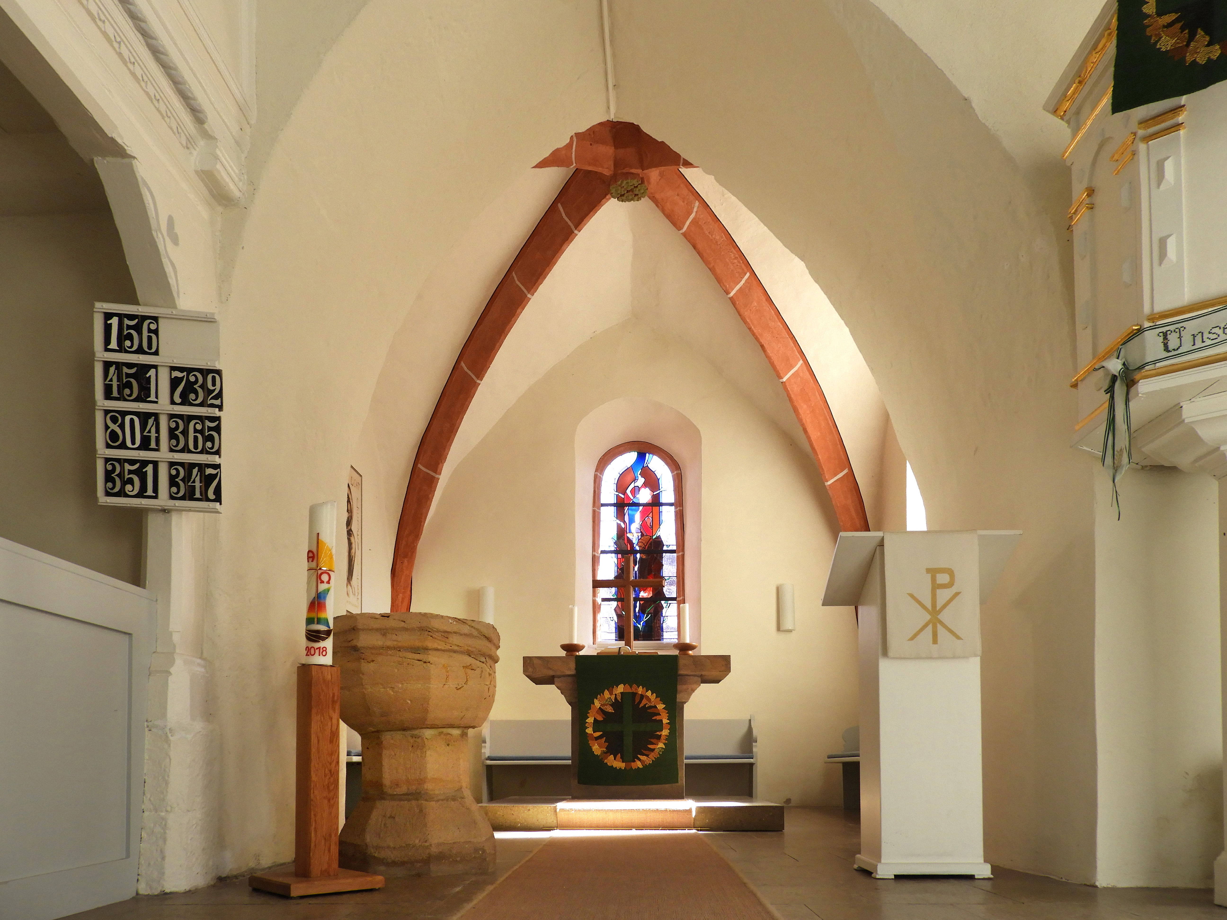 Der Chorraum der St. Martinskirche wird durch ein Kreuzrippengewölbe überfangen, dessen Schlussstein eine vierteilige Rosette zeigt. Besondere Ausstattungsstücke sind eine Altarplatte aus vorreformatorischer Zeit und ein Taufstein von 1571. Das Altarfenster hat der Glasmaler E. Jakobus Klonk aus Wetter bei Marburg entworfen und ausgeführt. Wegen ihrer künstlerischen, geschichtlichen und städtebaulichen Bedeutung ist die Kirche ein geschütztes Kulturdenkmal. Hoheneiche ist ein Ortsteil der Gemeinde Wehretal im nordhessischen Werra-Meißner-Kreis.